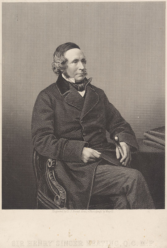 Sir Henry Singer Keating (1804-1888)